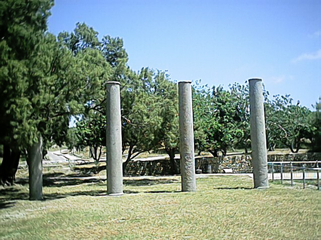 עמודים רומיים שצולמו בפארק הלאומי באשקלון